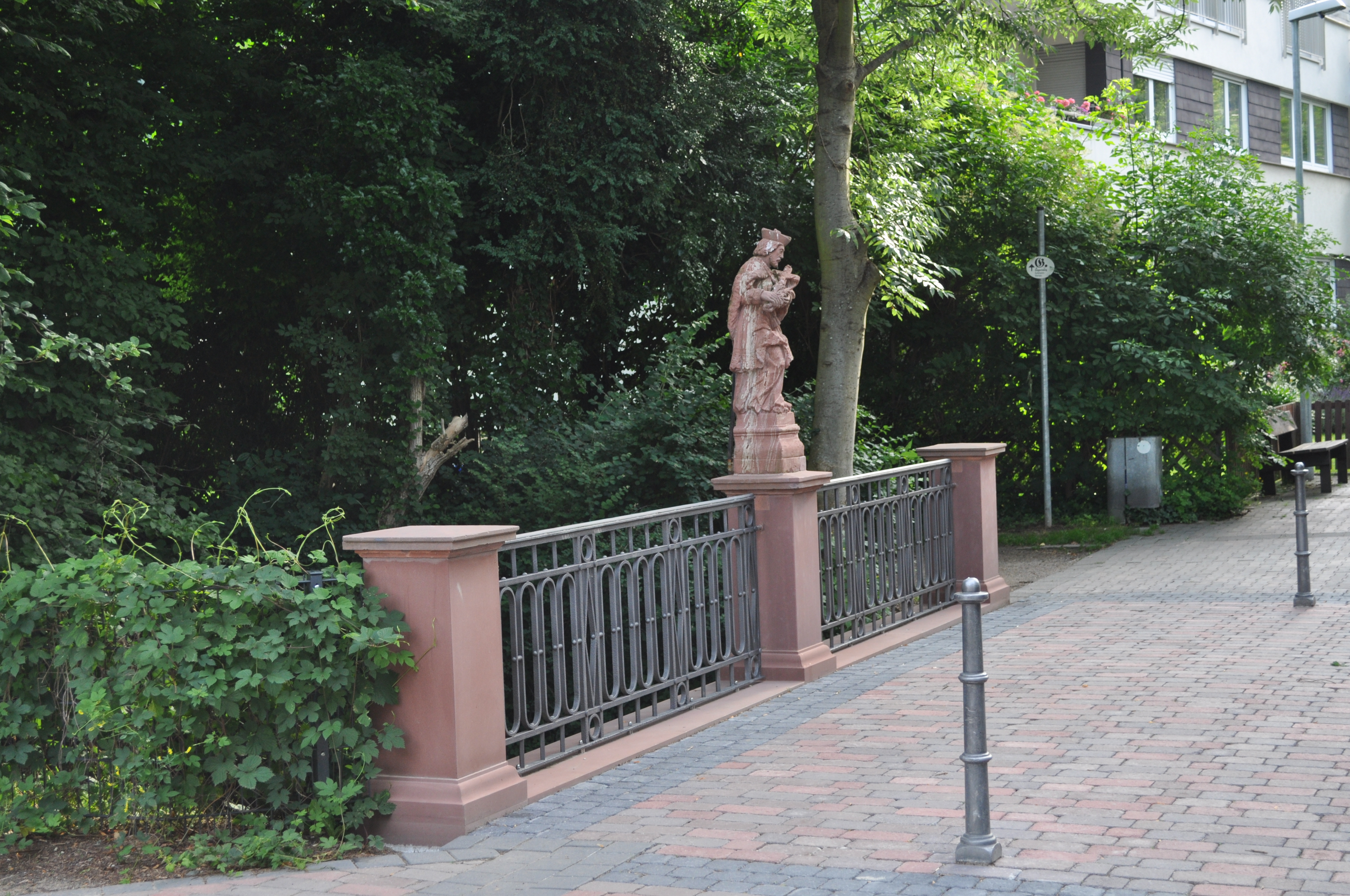 Hornau, Liederbachbrücke, Hl. Nepomuk